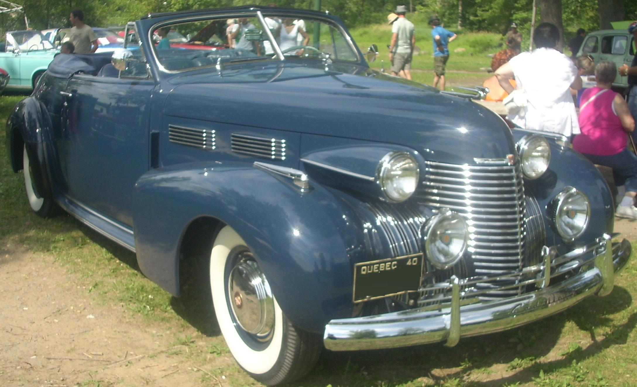 1940 Cadillac photographed in Laval, Quebec, Canada at Auto classique Laval 2010.